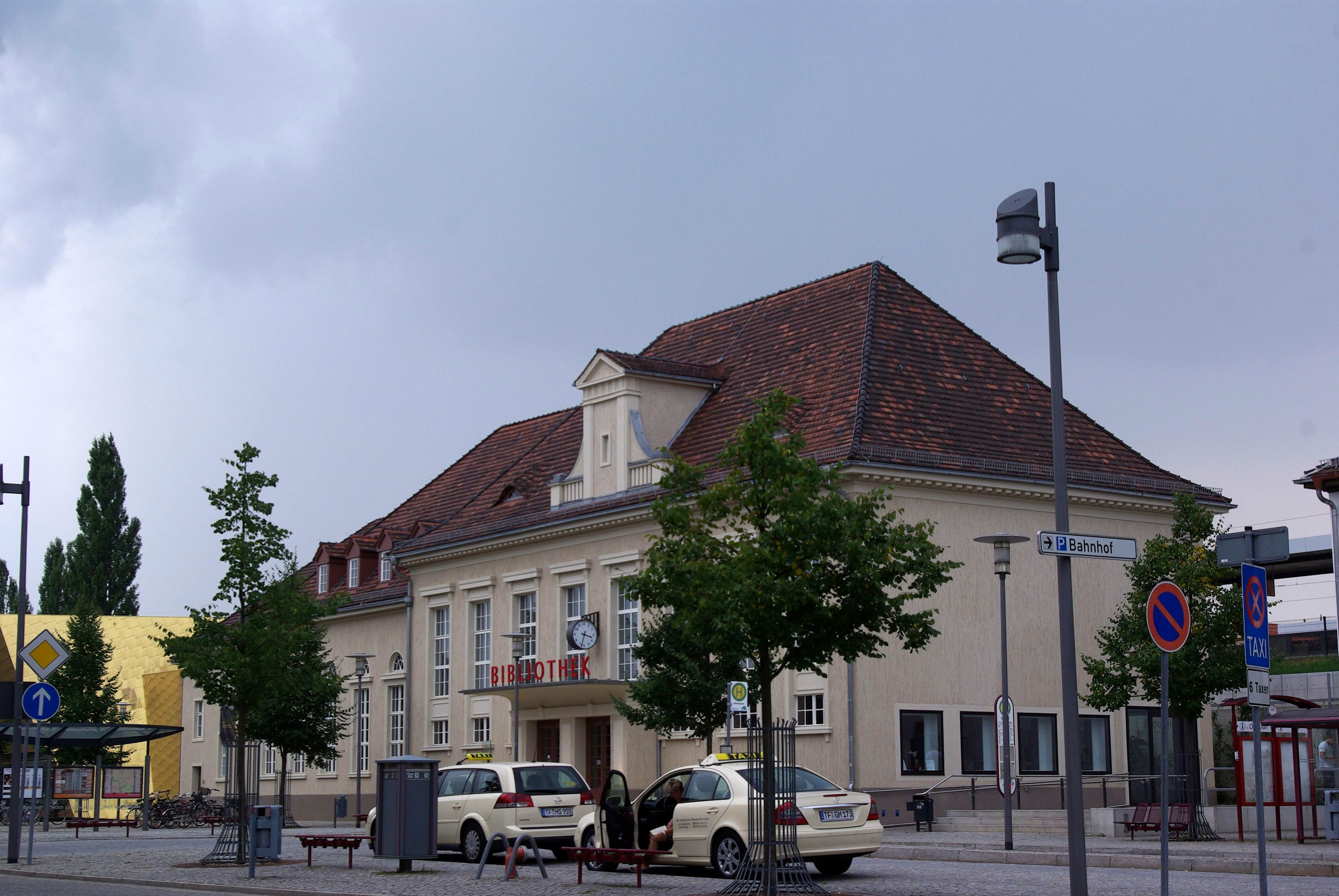 Luckenwalde in Brandenburg. Der Bahnhof (Hauptbahnhof) steht unter Denkmalschutz.